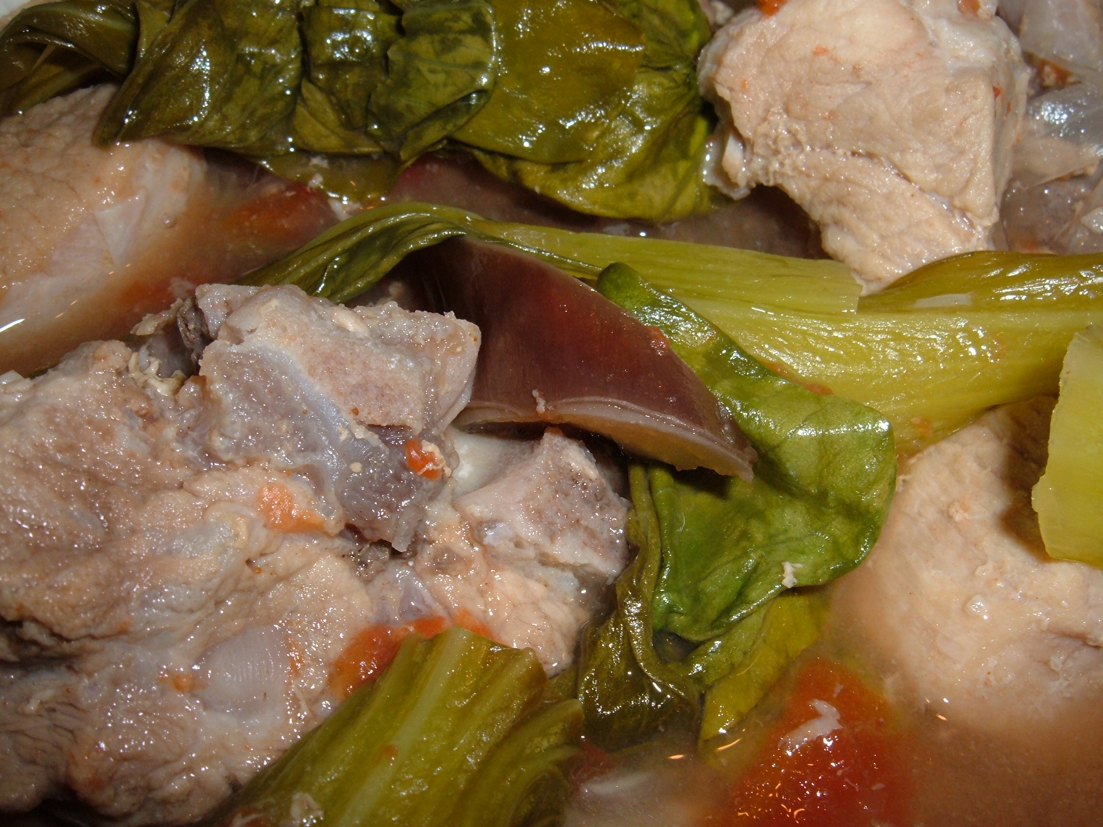 Pork sinigang/sinigang na baboy